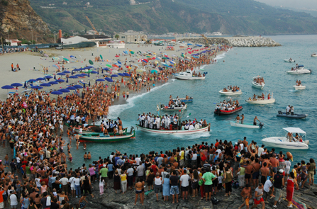 Inizio processione a mare Madonna dell'Alto Mare Palmi